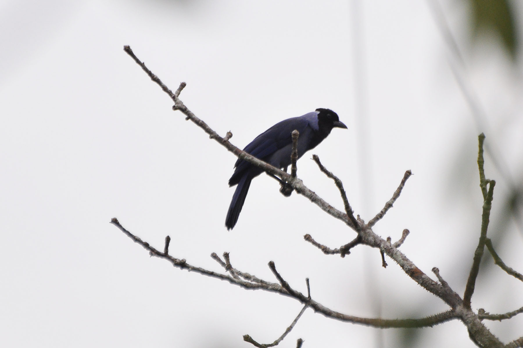 Violaceous Jay Cyanocorax violaceus violaceus, Sacha Lodge, Ecuador